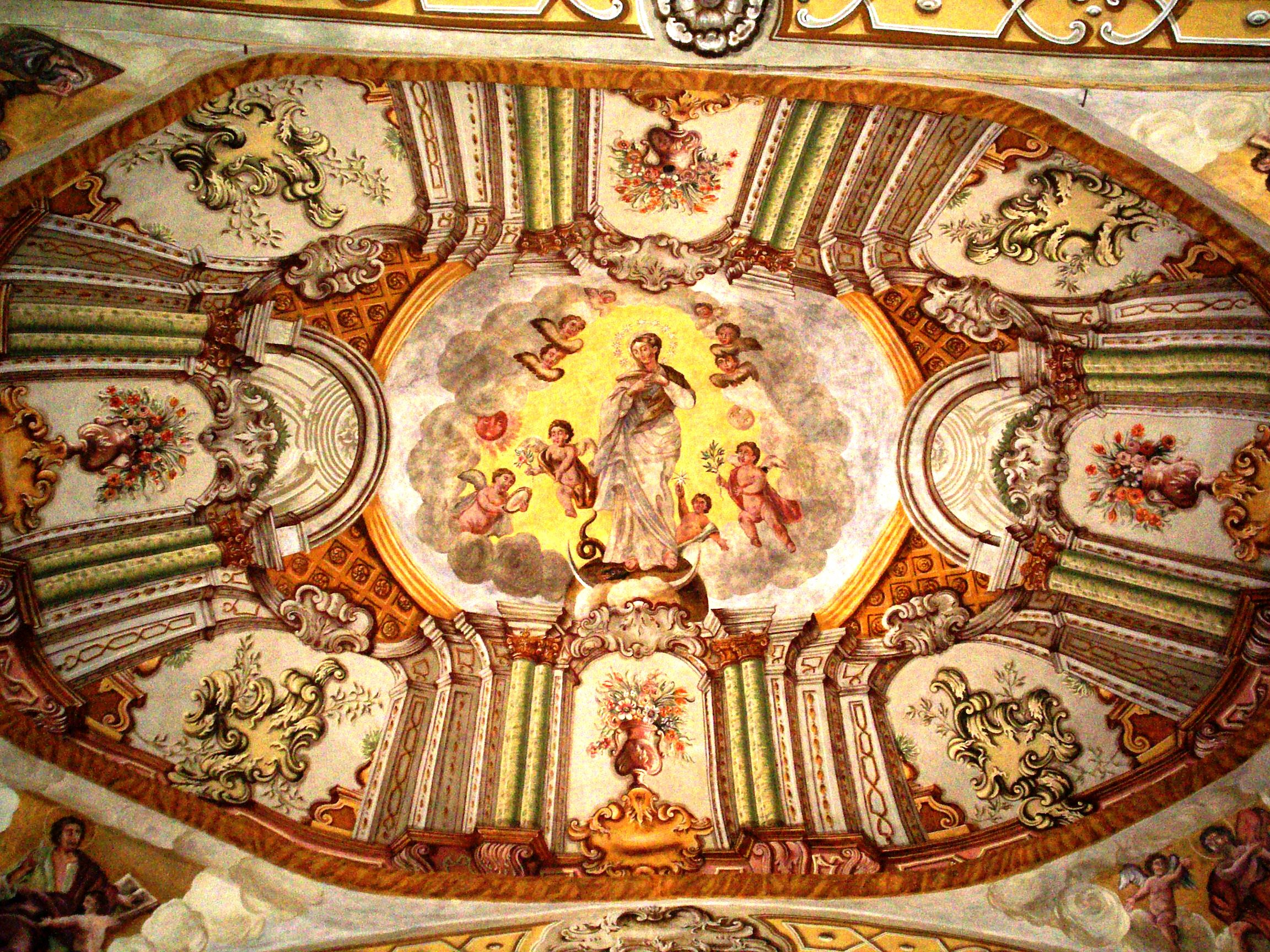 Particolare della cupola della Confraternita della Madonna del Pianto in Cerreto Sannita (Bn)